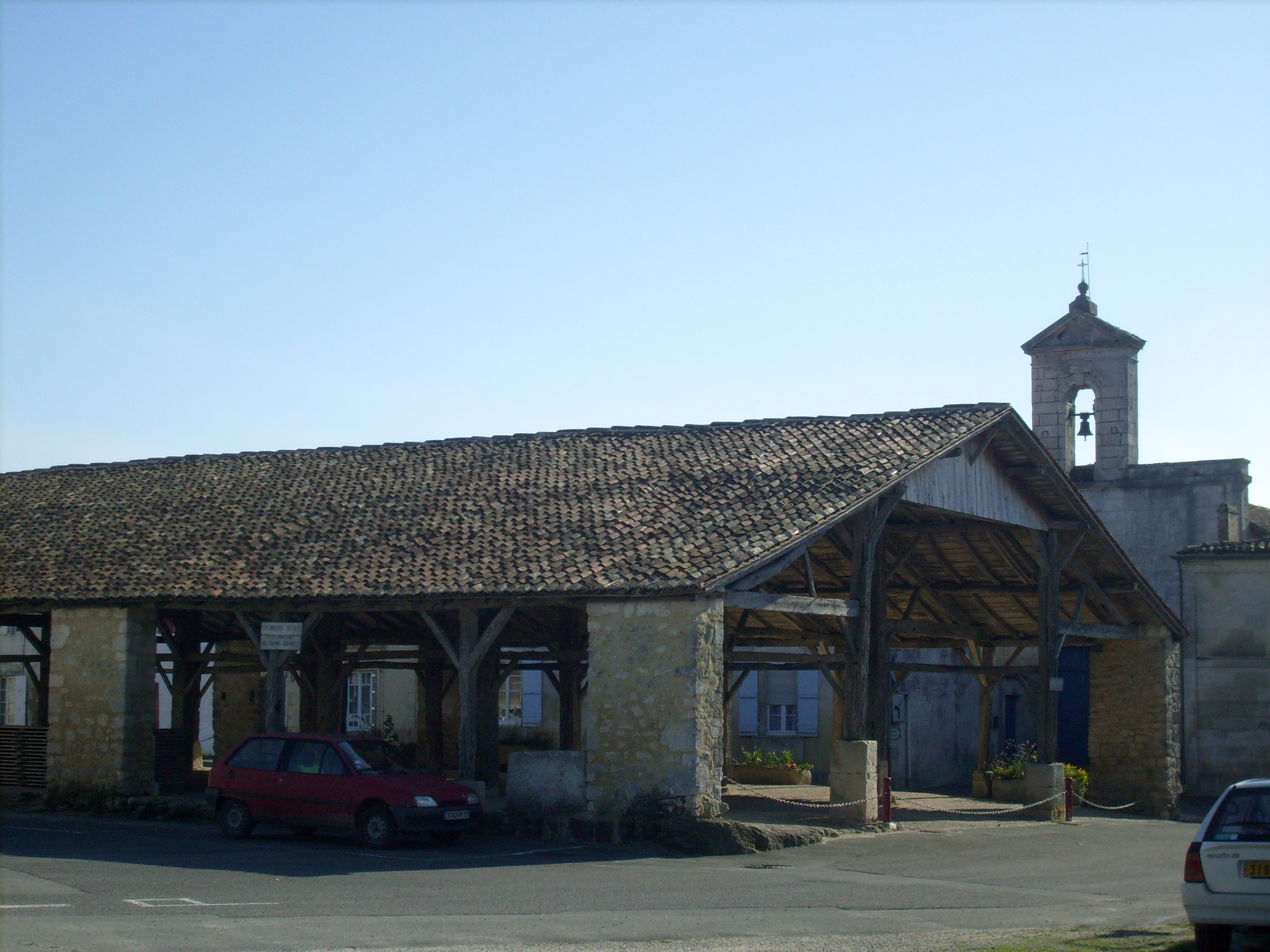 Pisany